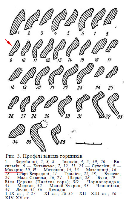 Профілі вінець горщиків